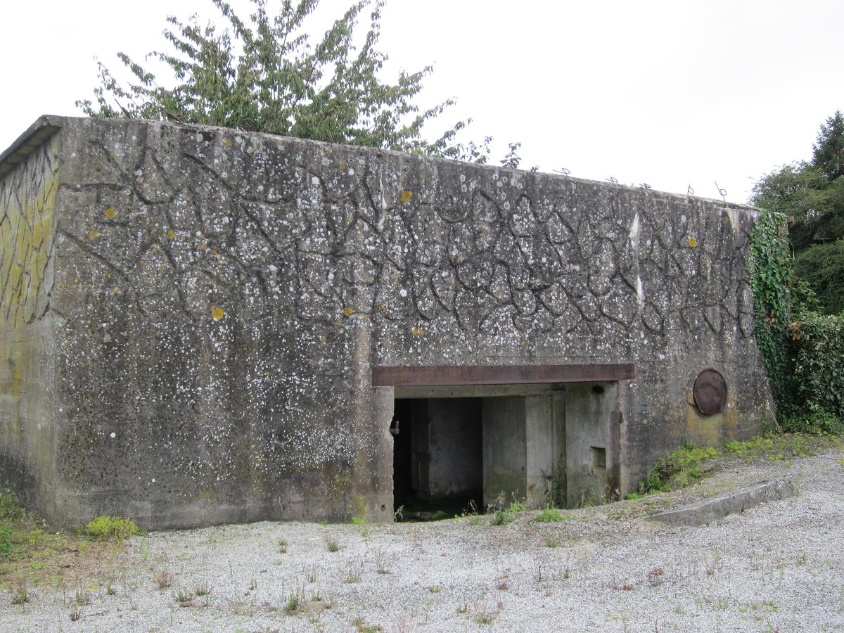 Blockhaus à Morsalines (50630)